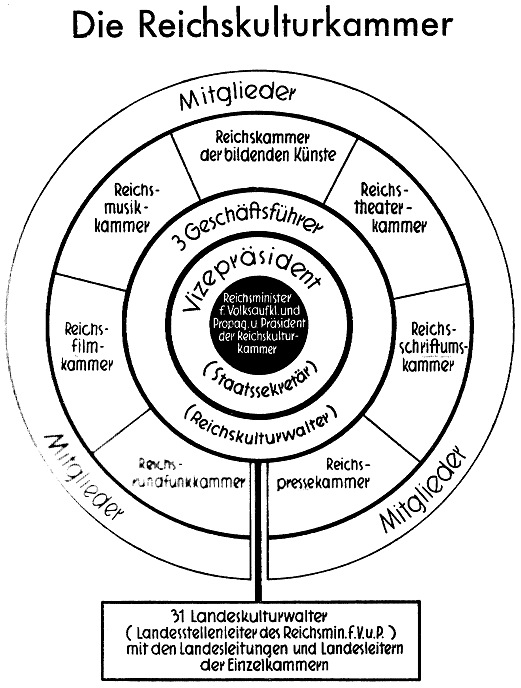 Organigrama del Reichskulturkammer